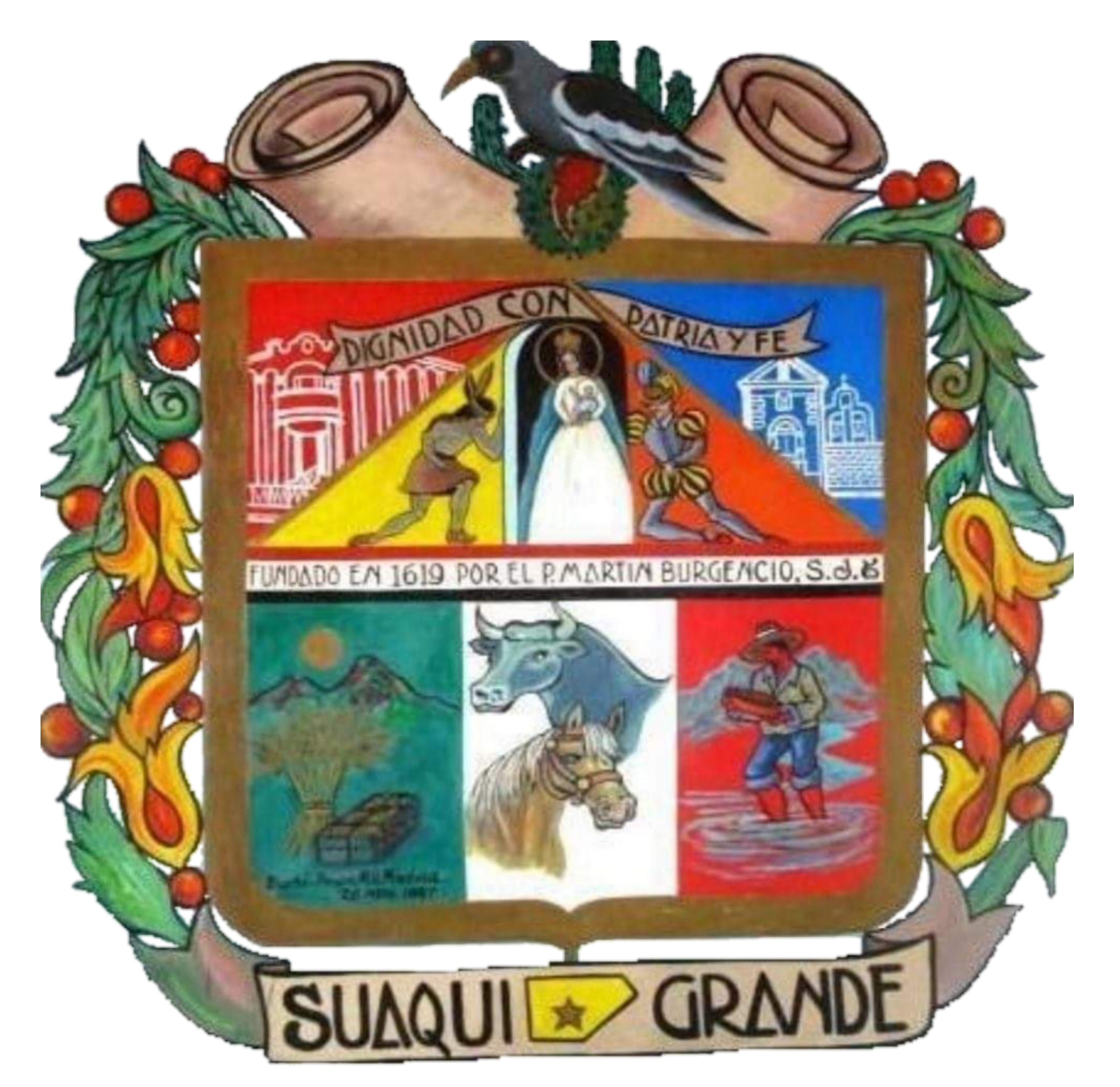 Escudo del municipio sonorense.